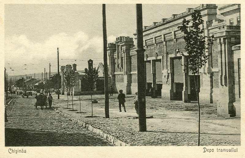 Трамвайное депо Кишинёва. Снимок 1930-х годов